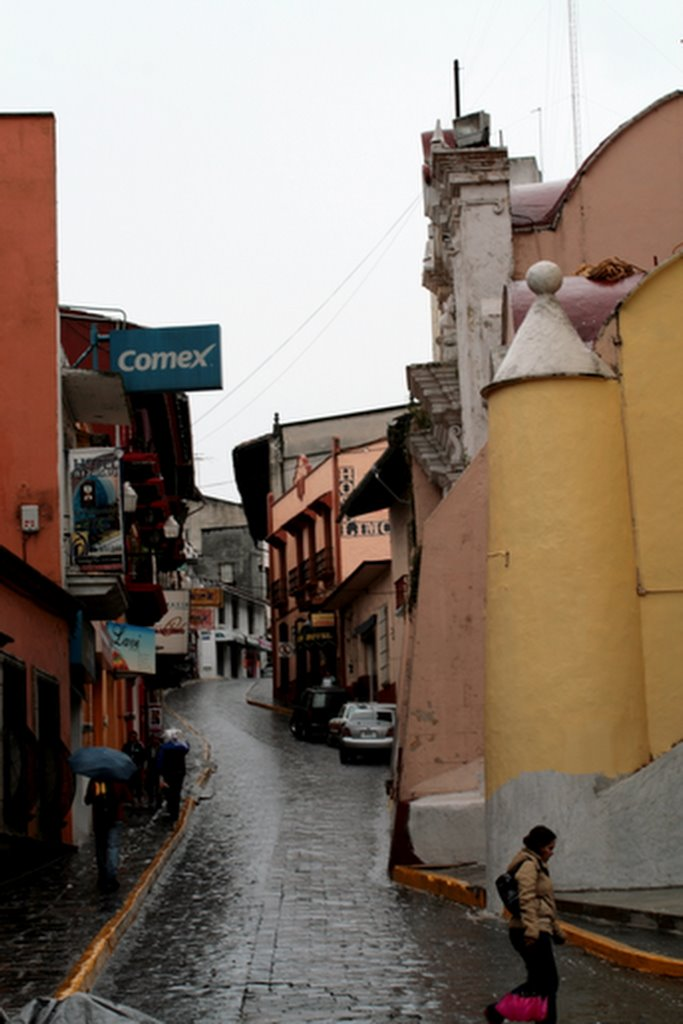 Día lluvioso tipico de la ciudad de Xalapa.